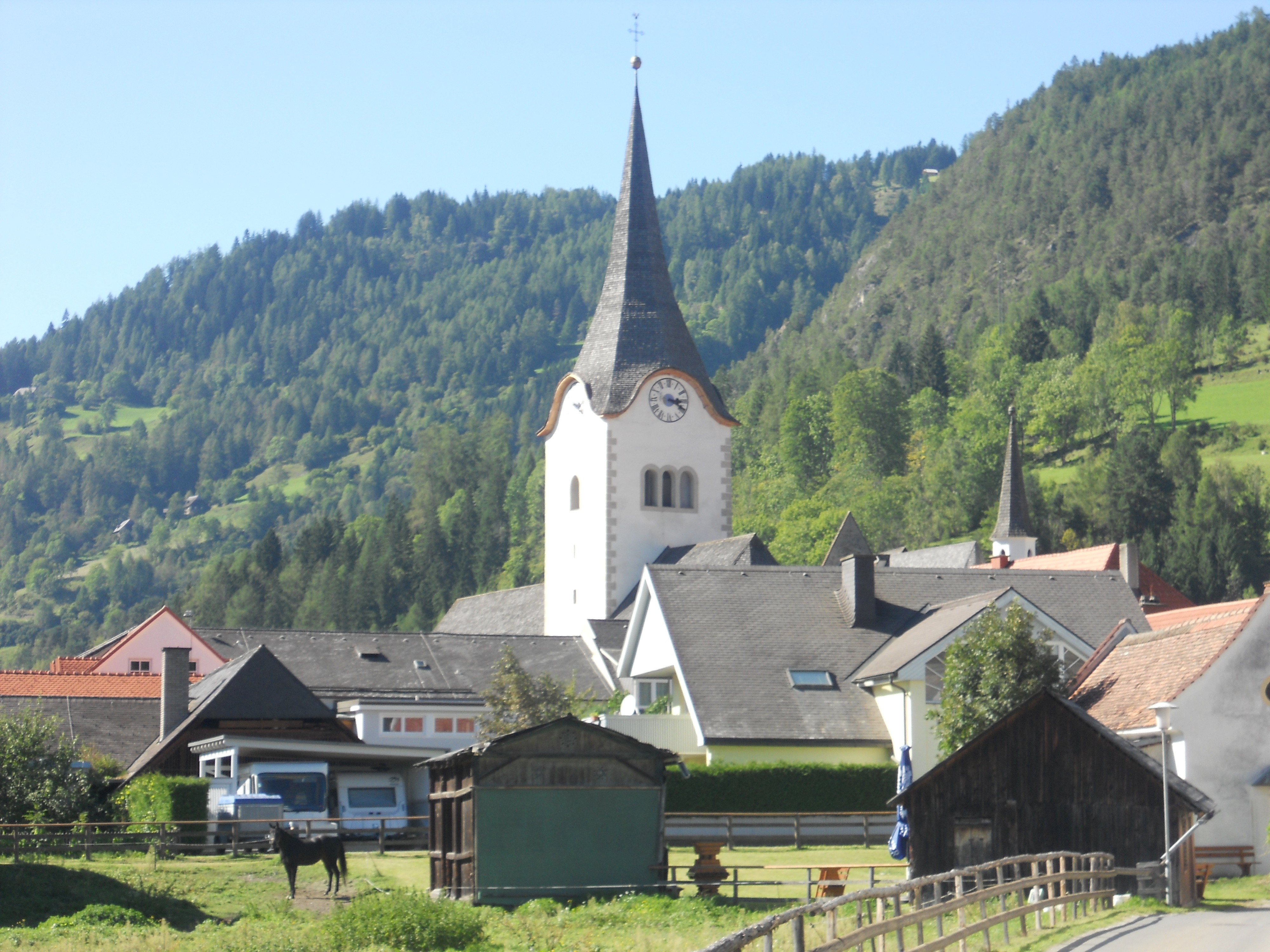 Ansicht von Oberwölz, in der Mitte der Turm der Stadtpfarrkirche St. Martin